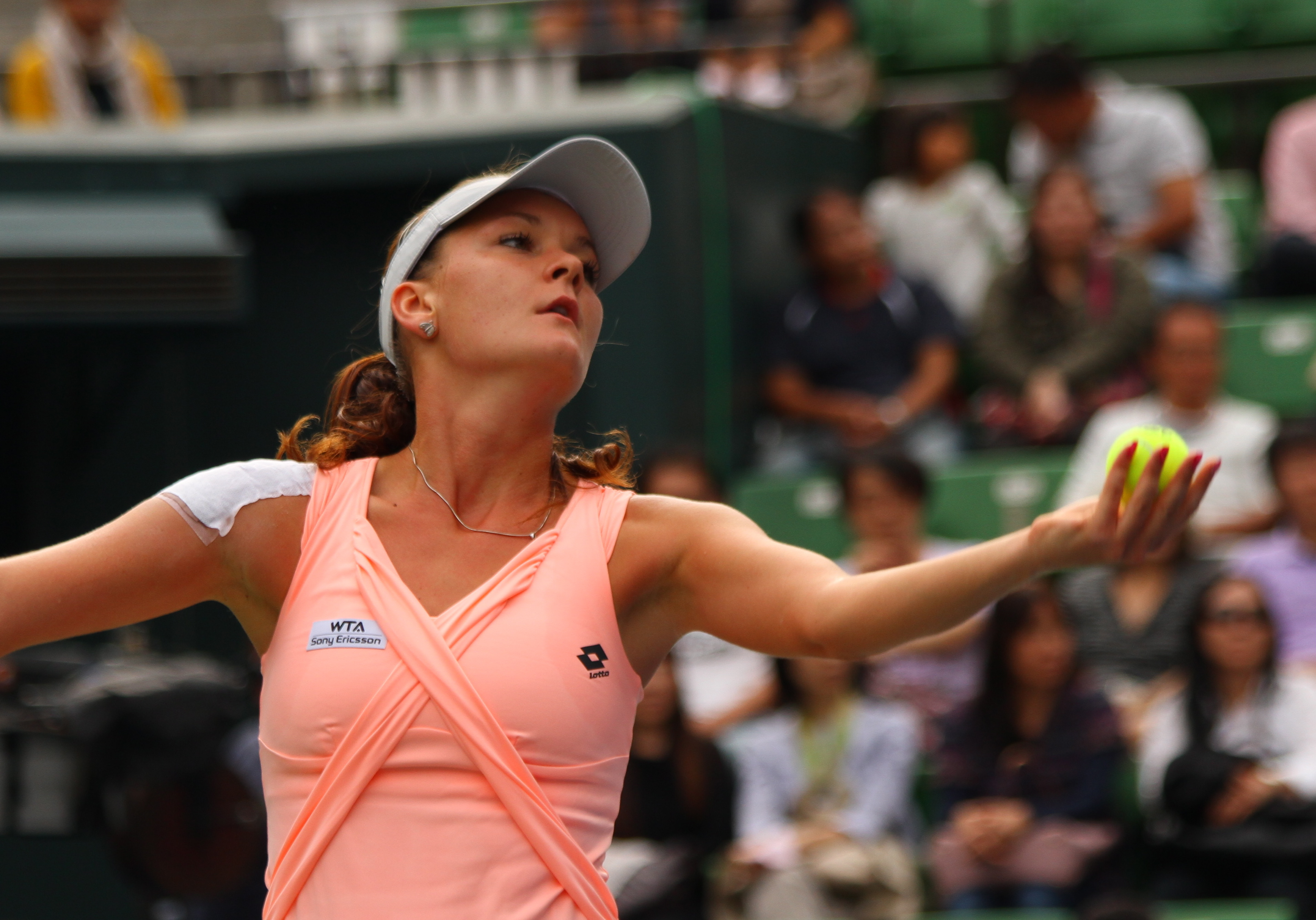 Agnieszka Radwańska at 2011 Pan Pacific Open